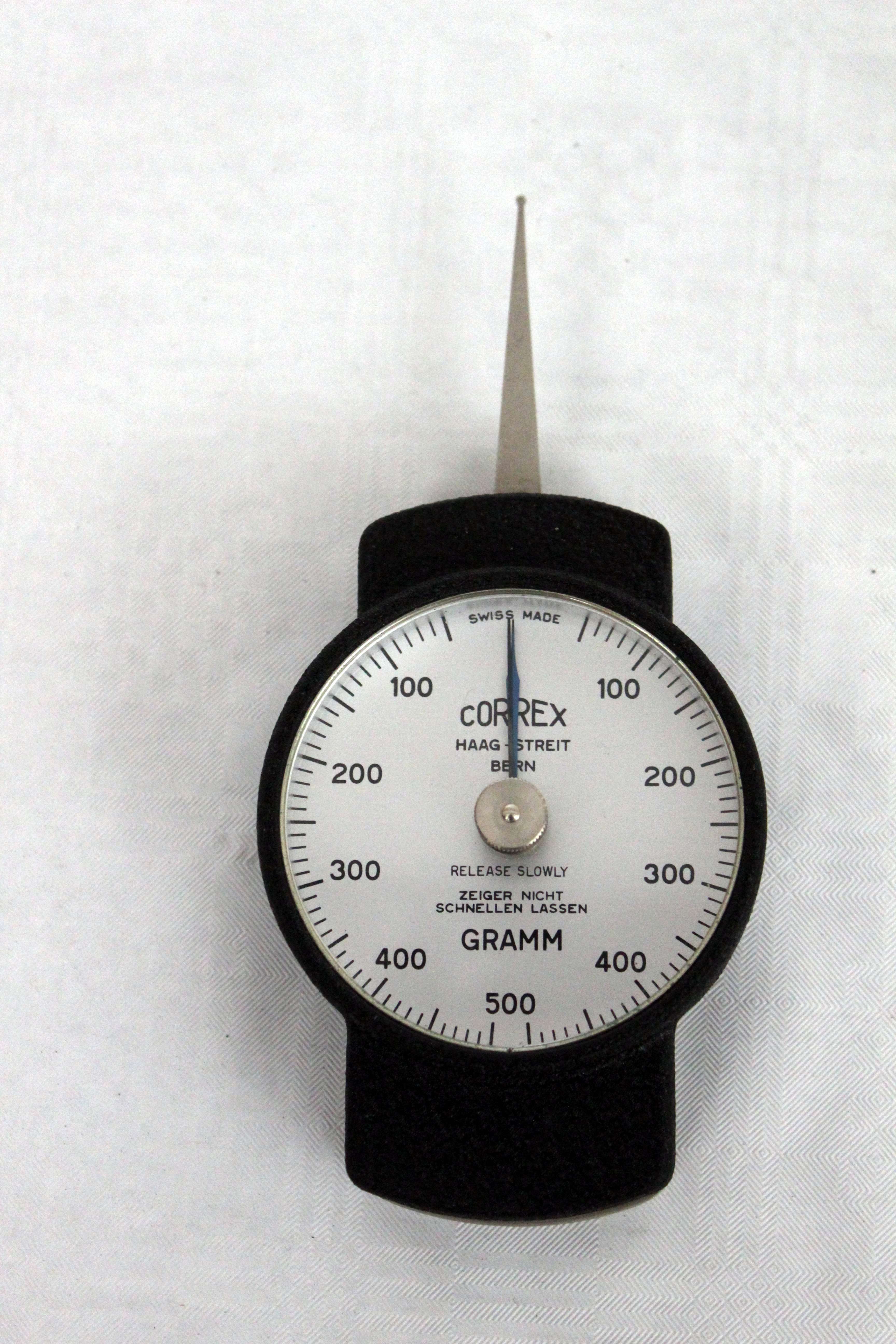 Correx Federwaage mit Schleppzeiger der Firma Haag-Streit aus Bern Aufgenommen im ehemaligen Fernmeldezentralzeugamt Elmshorn The making of this document was supported by the Community-Budget of Wikimedia Germany.